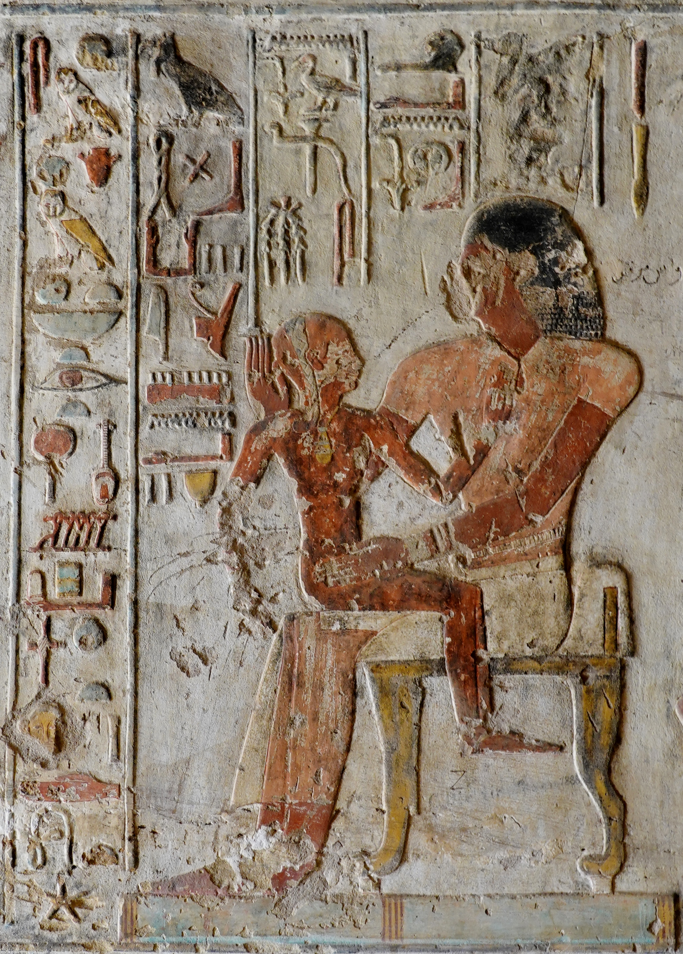 Felsengrab des Paheri unter den Felsengräbern des altägyptischen Necheb bei el-Kab, Ägypten